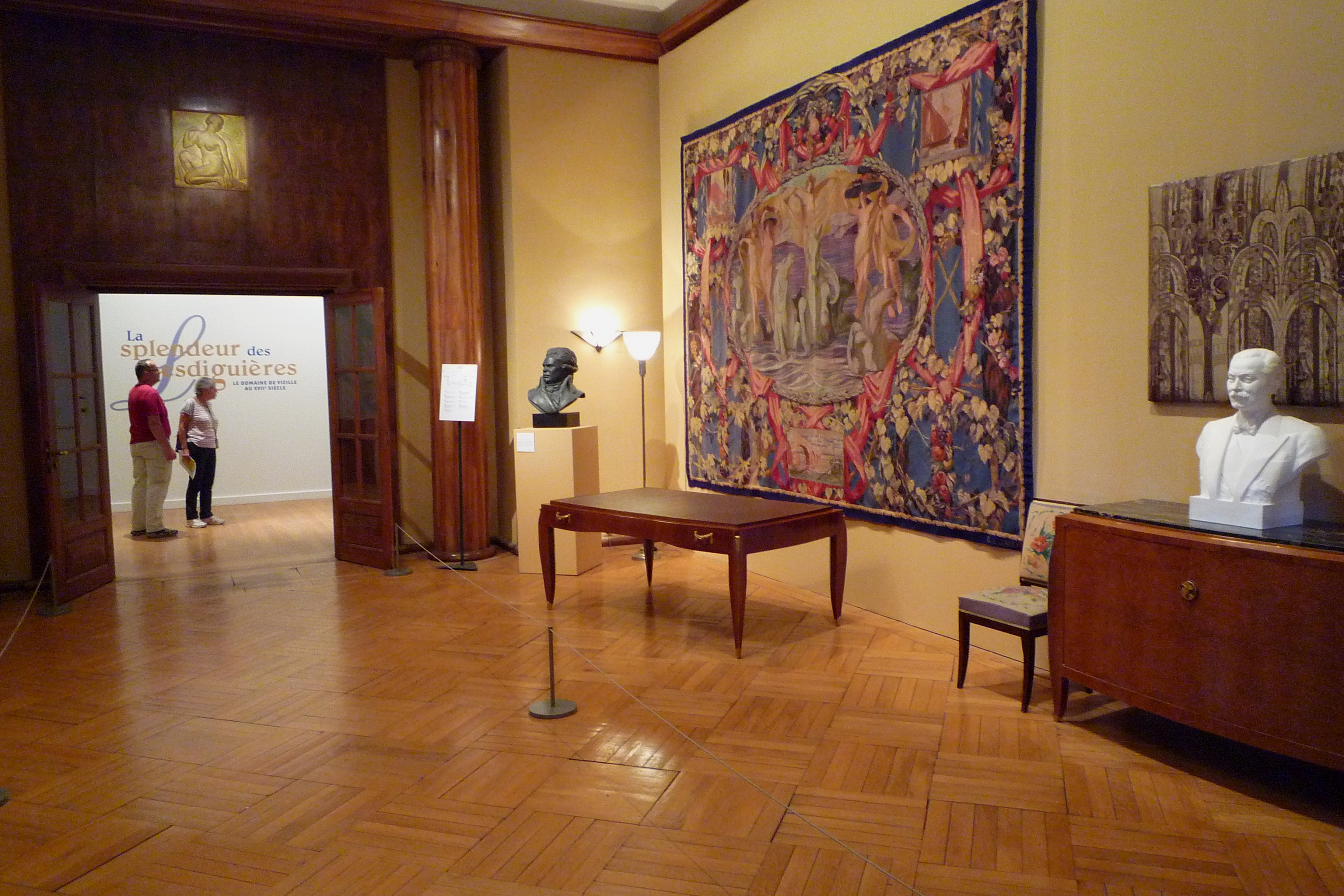 salle Charles Halley, musée de la Révolution française - Vizille (France)